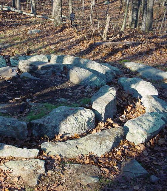 Gungywamp stone circle